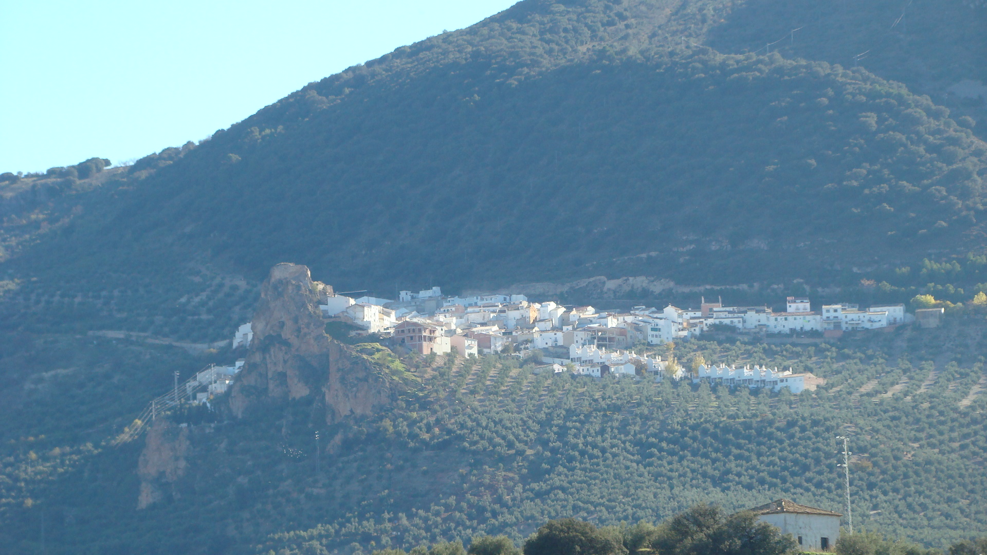 Vista lejana del pueblo de Solera (Jaén - España)